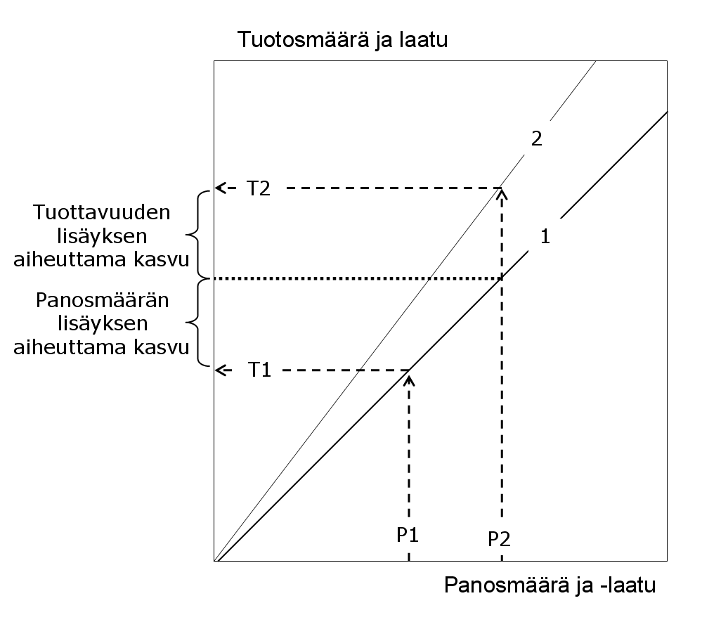 Taloudellisen kasvun komponentit